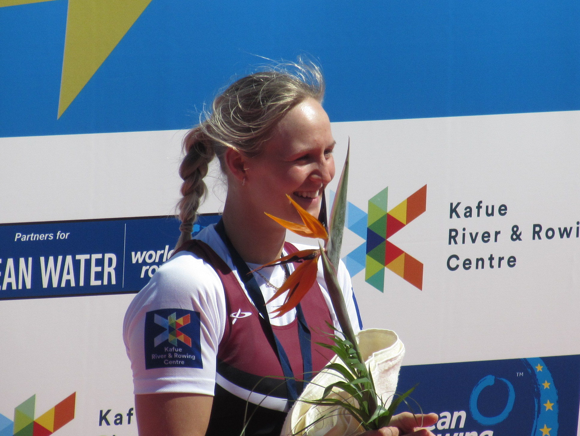 Elza Gulbe, Ruder-EM 2016